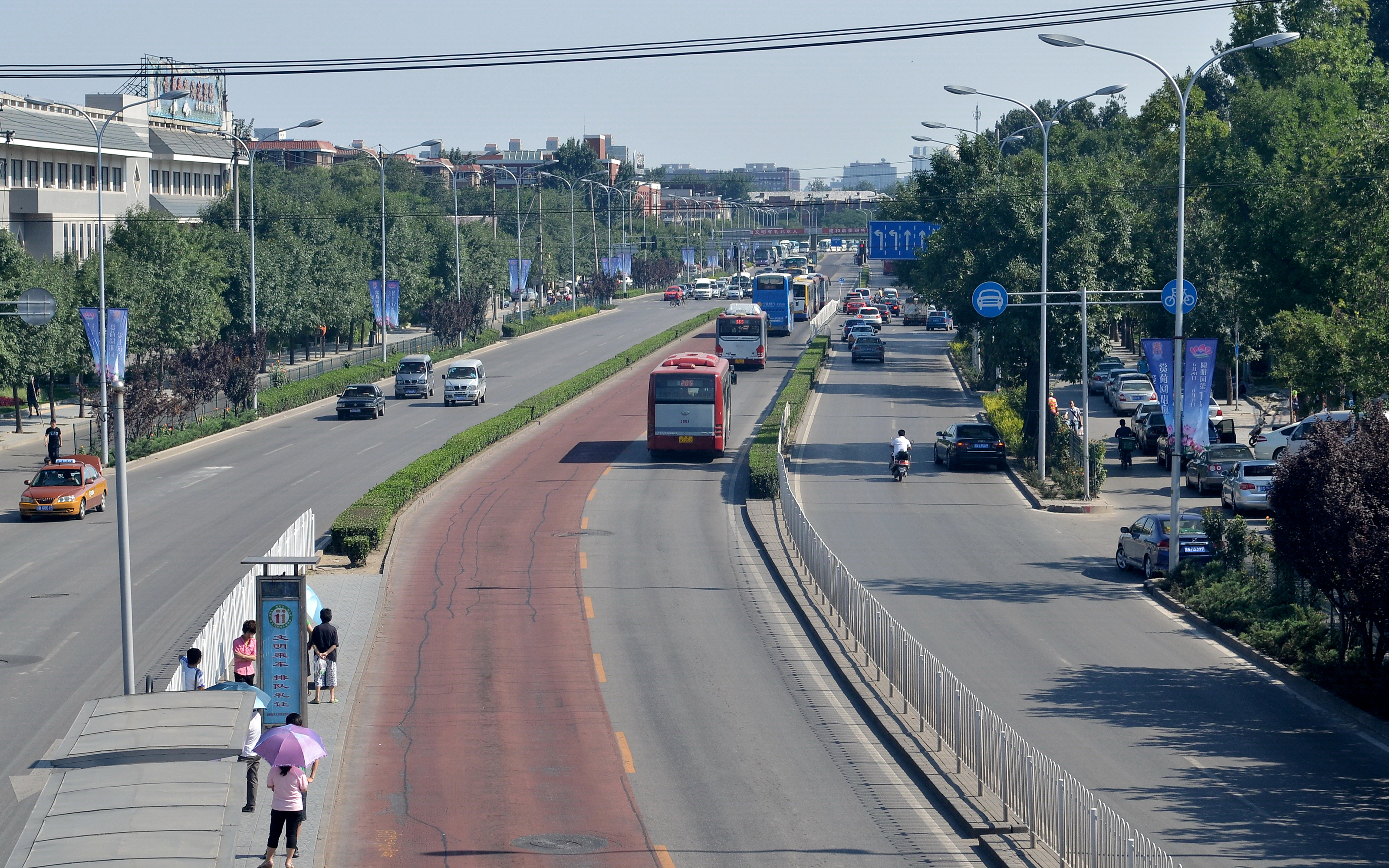 圆明园东路上的公交专用道